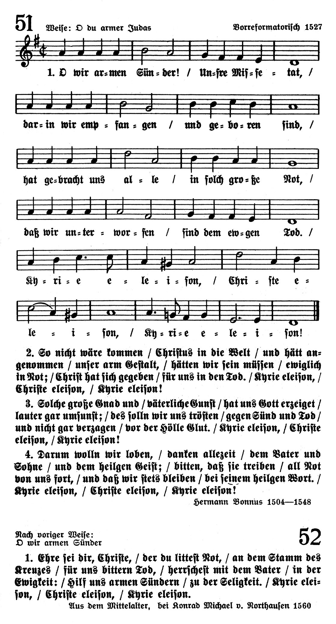 O wir armen Sünder und Ehre sei dir, Christe bei Otto Riethmüller, 1932